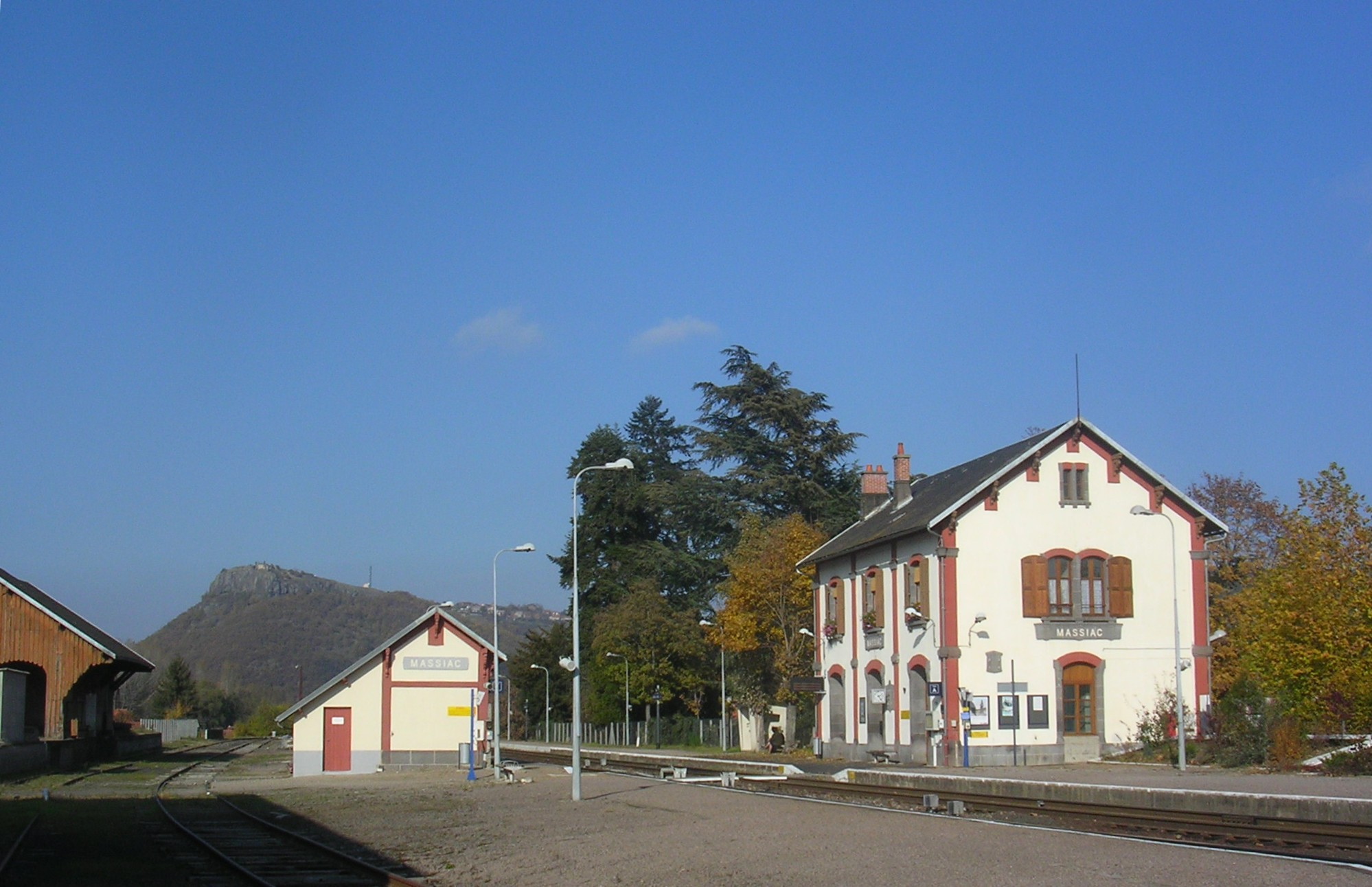 Gare SNCF de Massiac (Cantal - France)